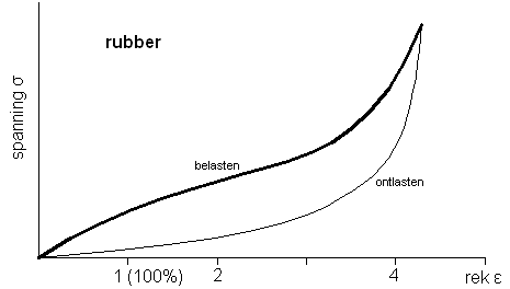 Spanning_rek_diagramma_rubber.PNG zelf, autoCAD+paint MADe 20 jun 2005 10:27 (CEST)